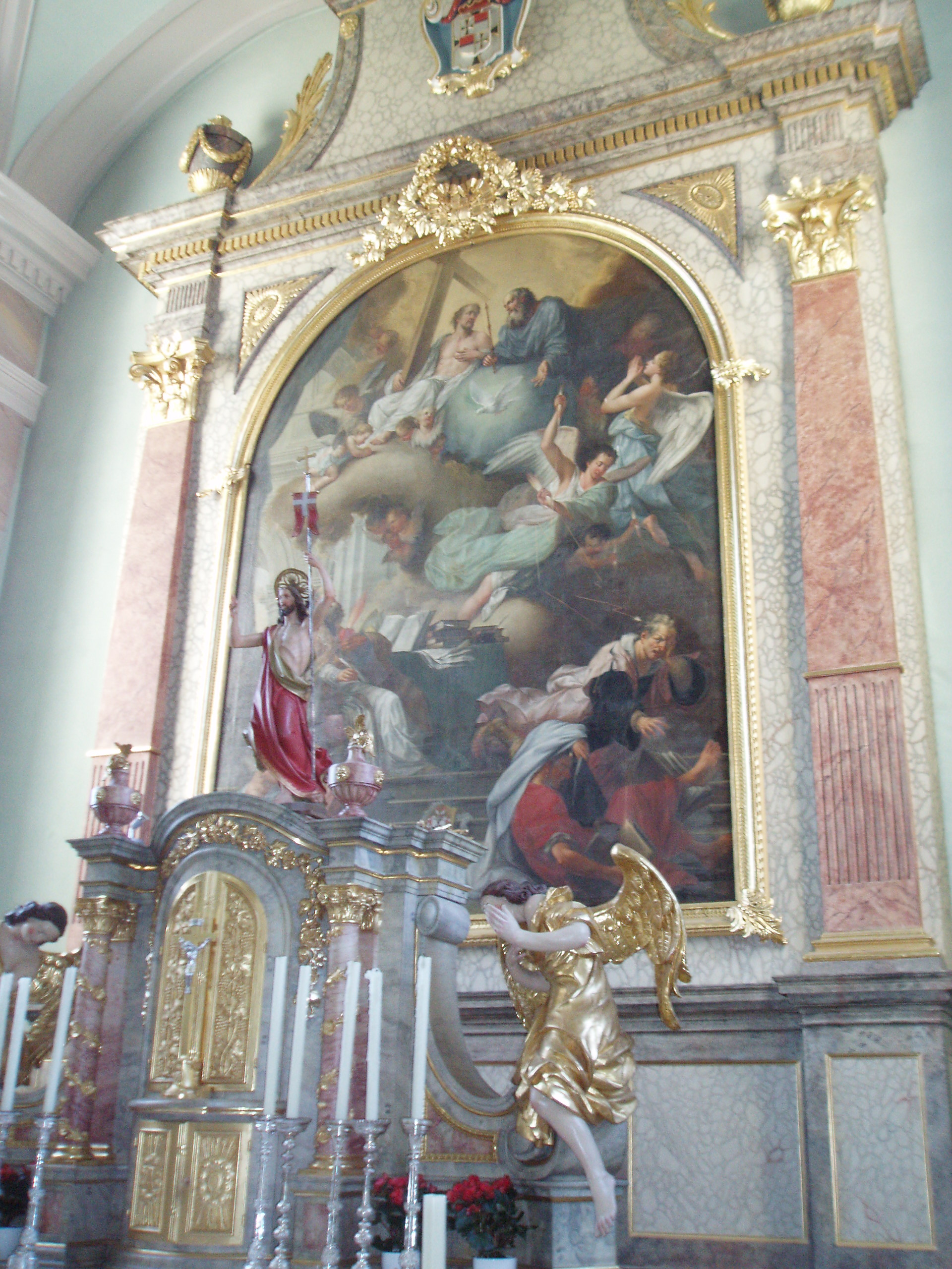 Stopfenheim, Kath. Pfarrkirche St. Augustin, Hochaltarbild